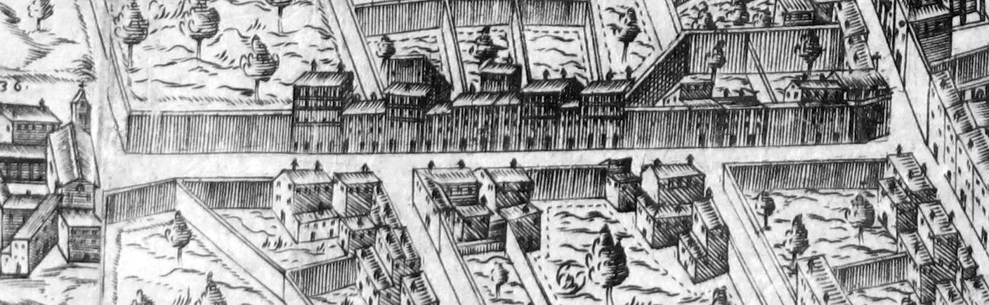 Pianta del buonsignori, dettaglio, via delle ruote